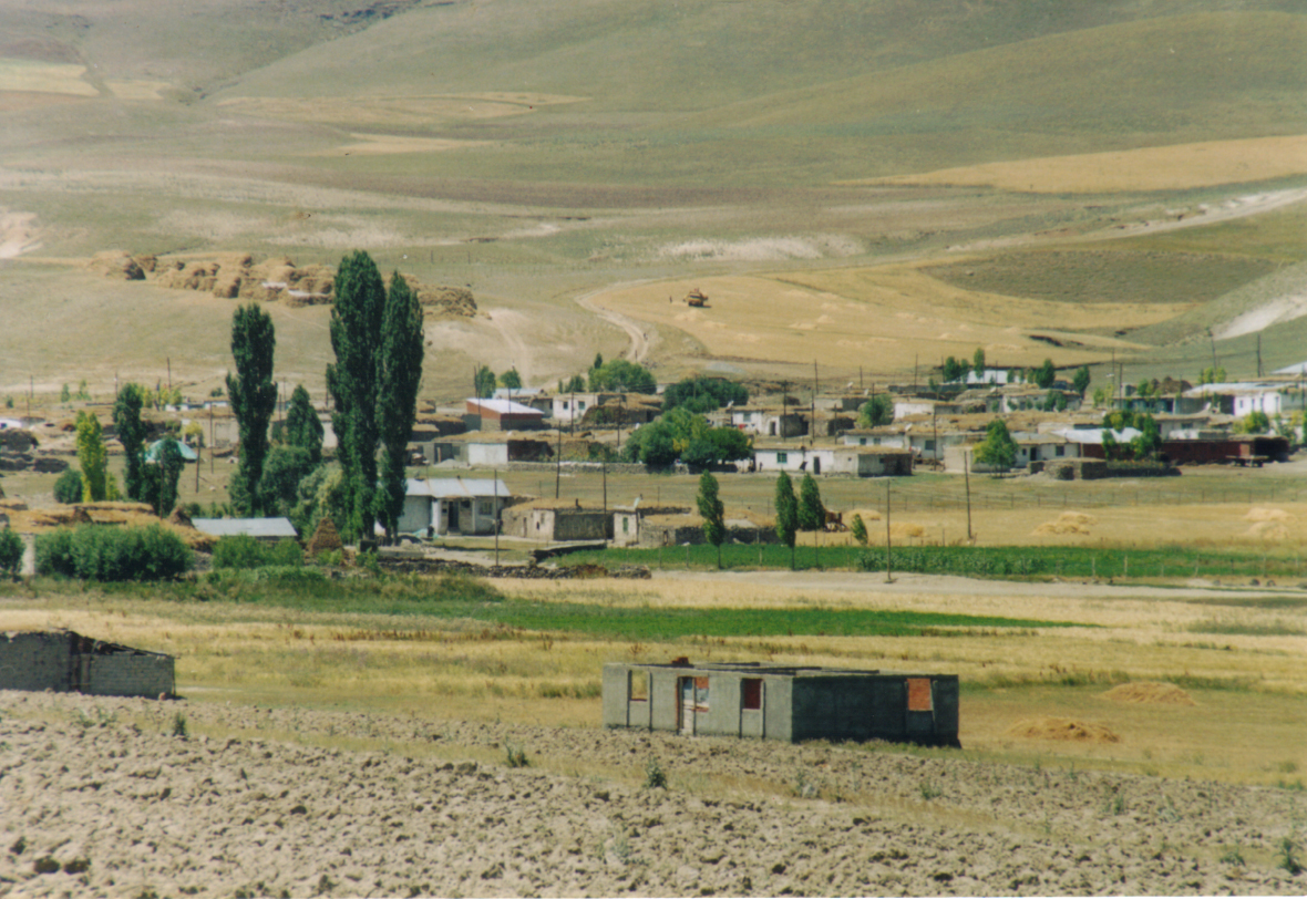 Blick auf das Dorf Armutlu köyü